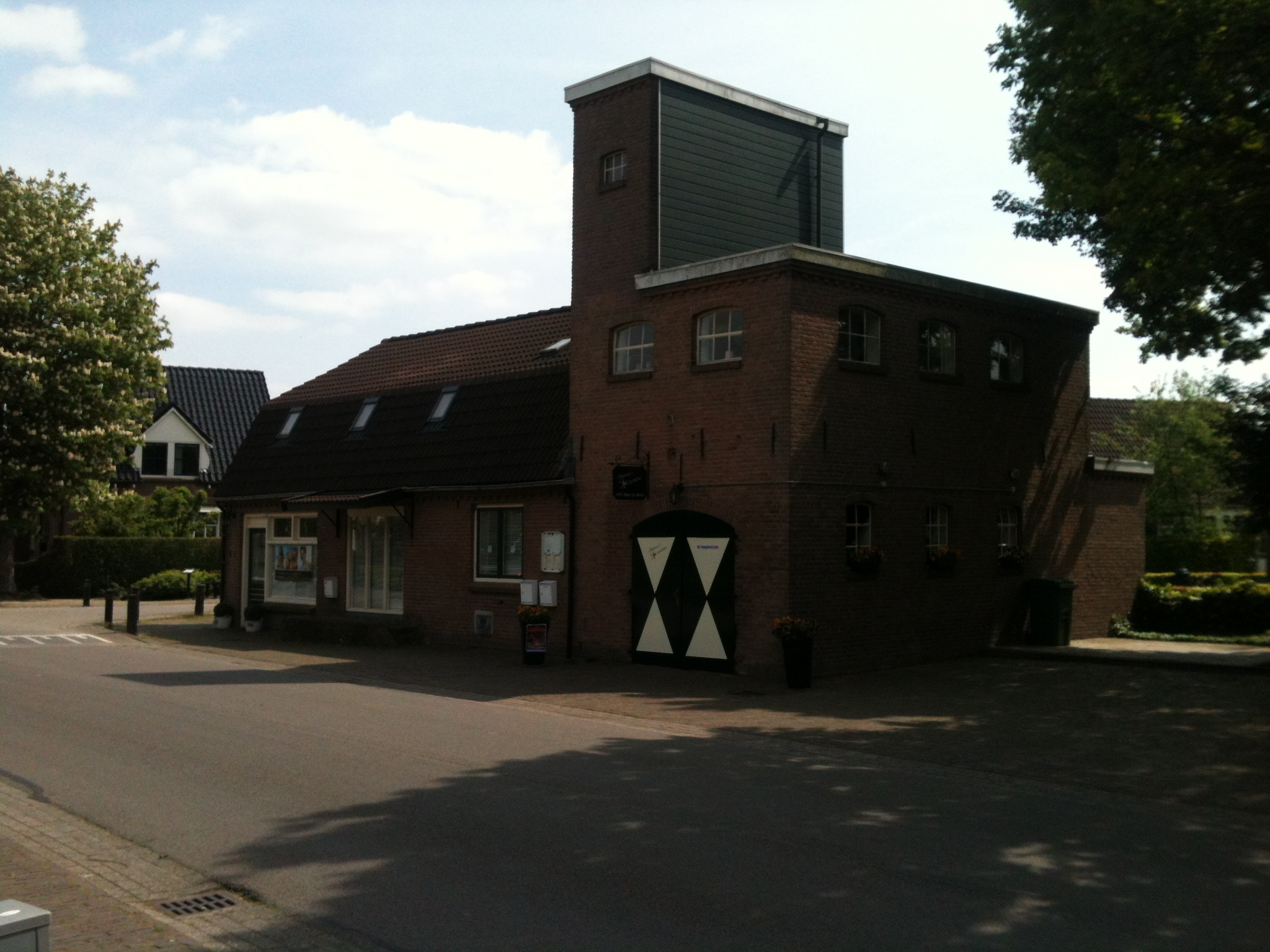 Foto van De Maalderij te Groessen, ook bekend als Coöperatie ‘De Vooruitgang’